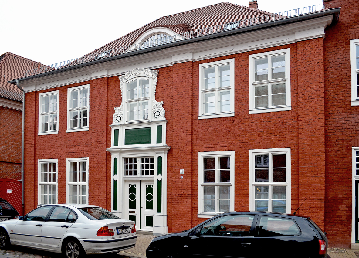 Traufenhaus im Holländischen Viertel in Potsdam